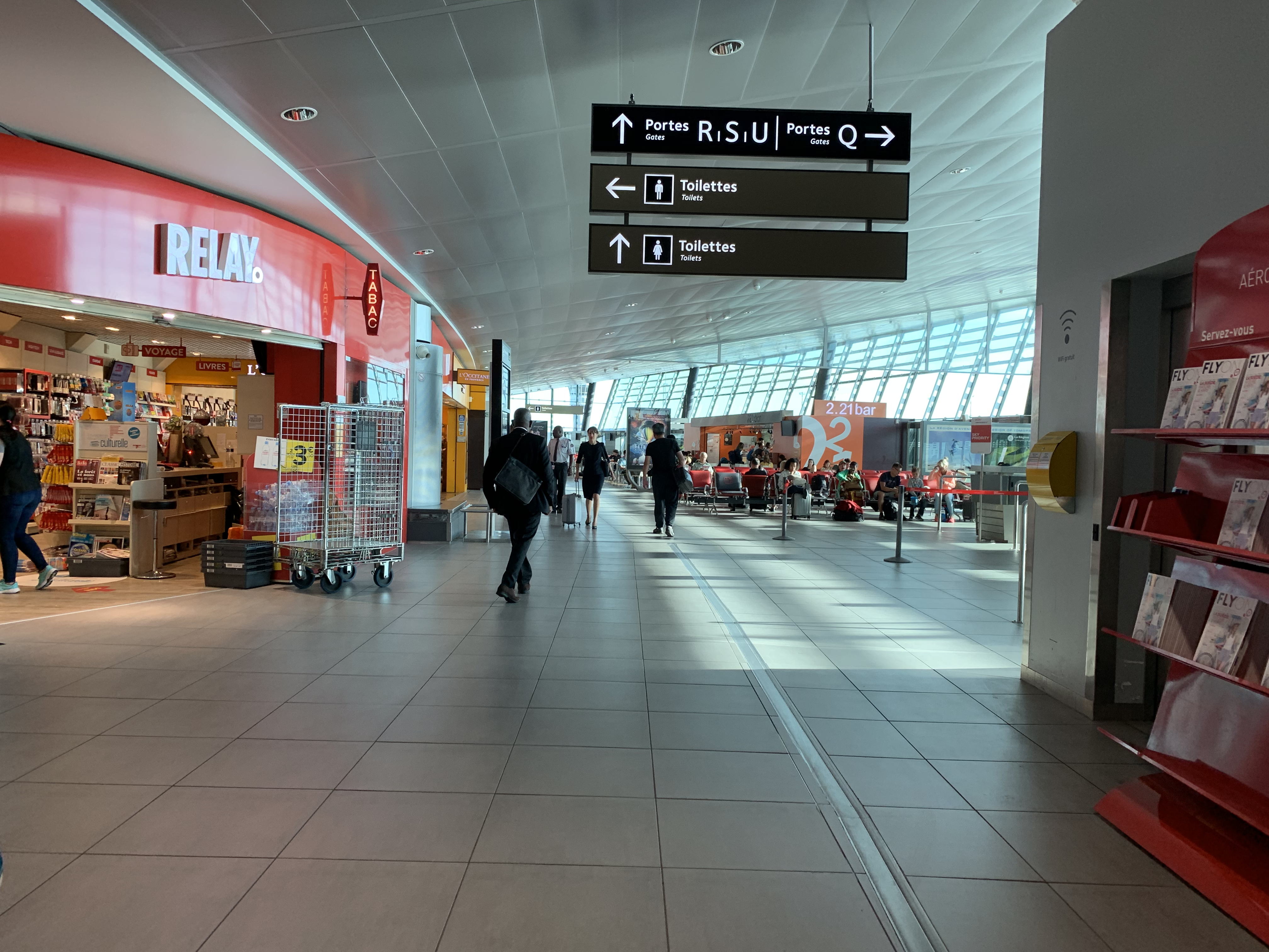 Intérieur de l'aéroport de Lyon-Saint-Exupéry (terminal 2) en juillet 2019.